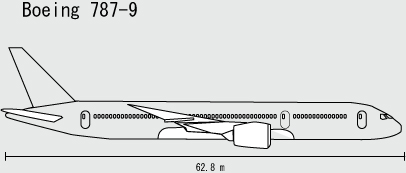 View of Boeing 787 -9.